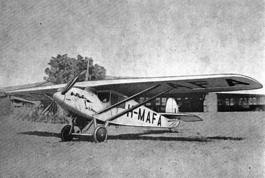 A FEIRO cég FEIRO-Daru repülője